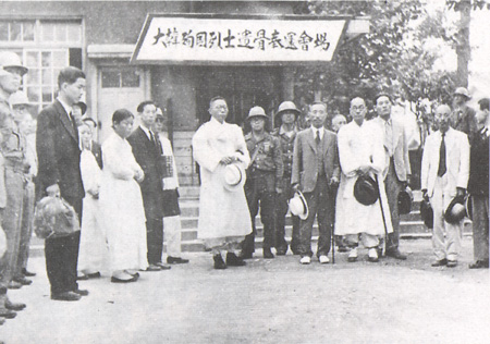 1946년 06월 3의사 유해봉환식장